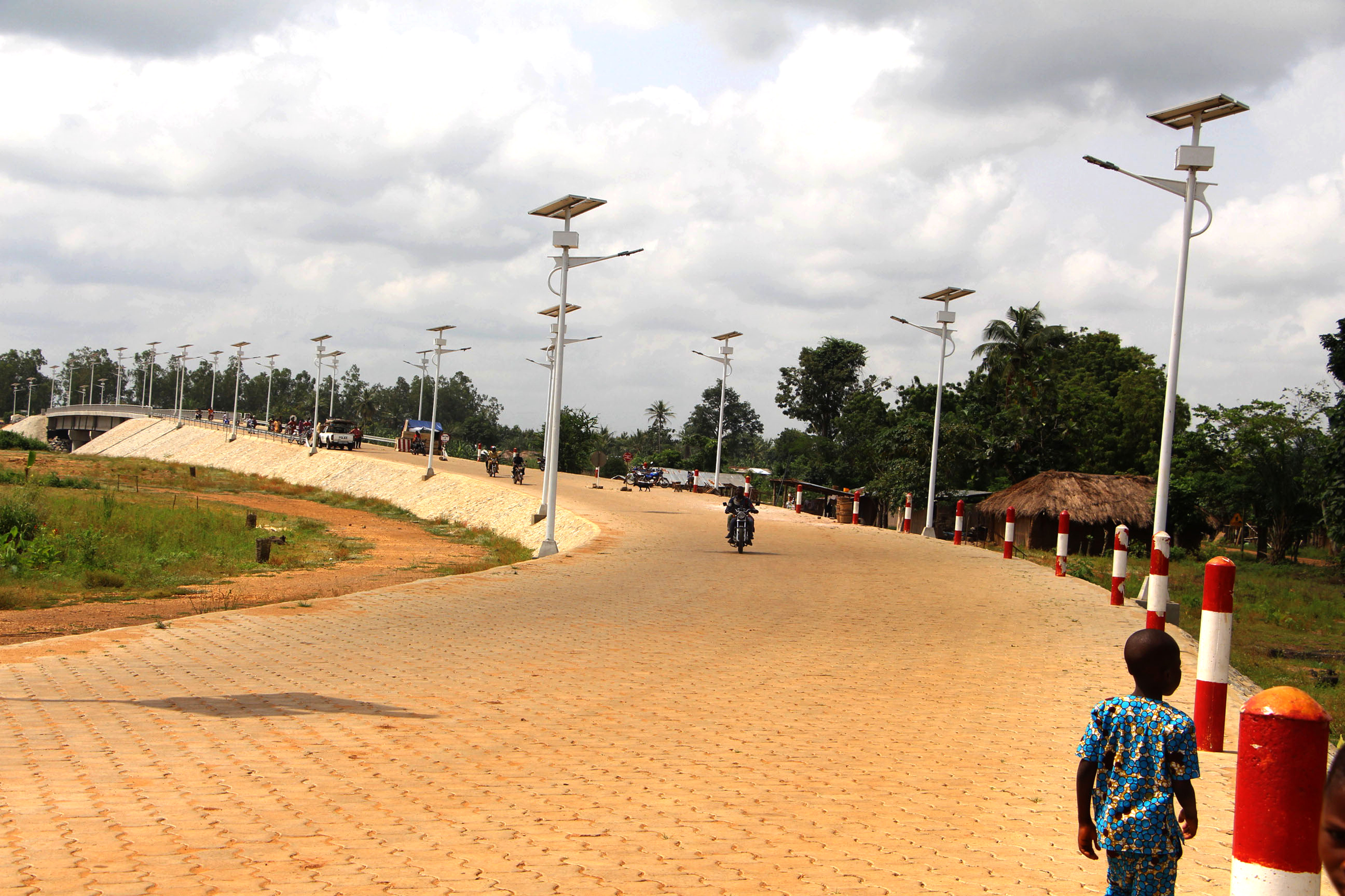 a finally the population of Atiémé will be able easily the river with this bridge This is an image with the theme "Africa on the Move or Transport" from: Benin